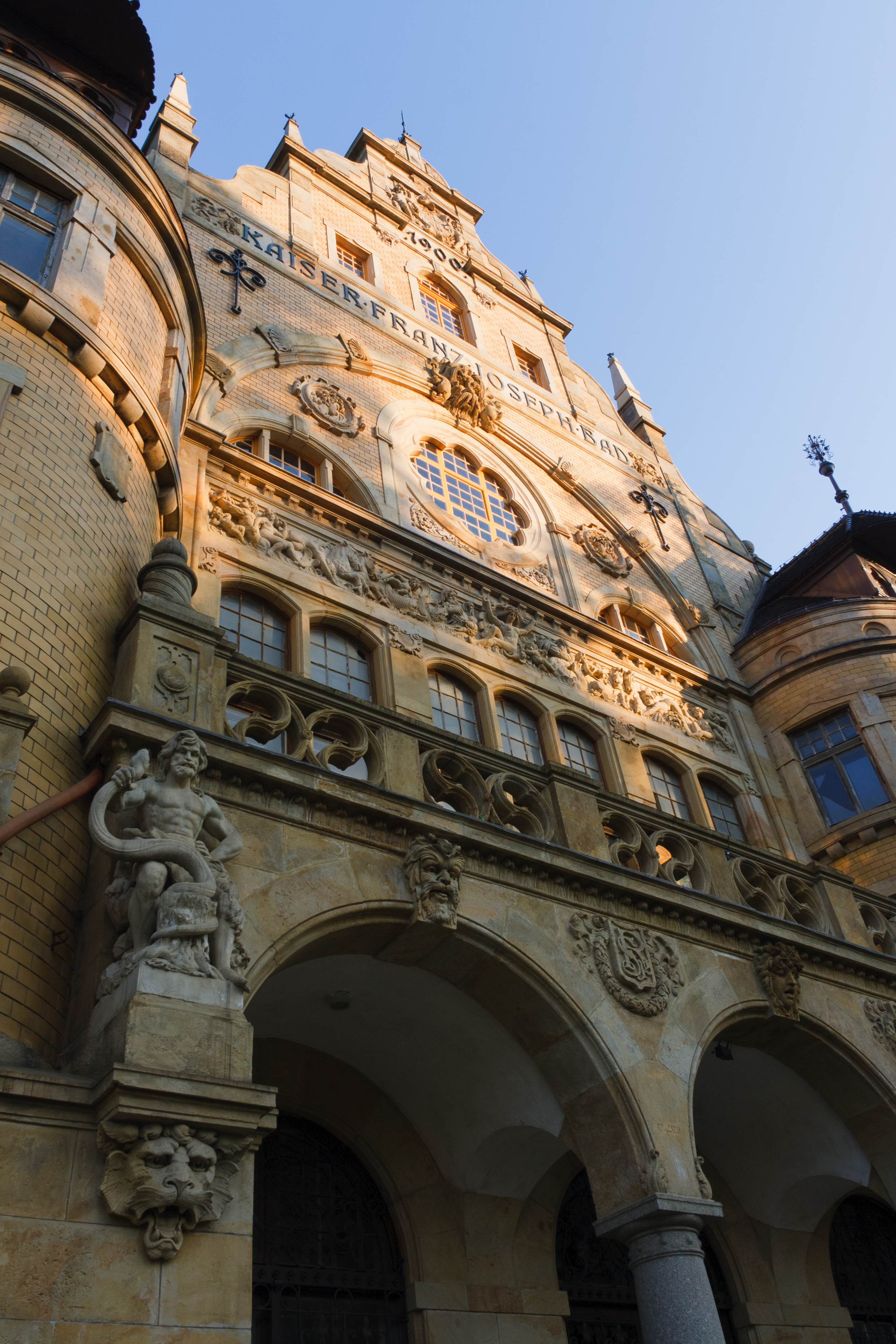 Městské lázně Liberec, hlavní vstup